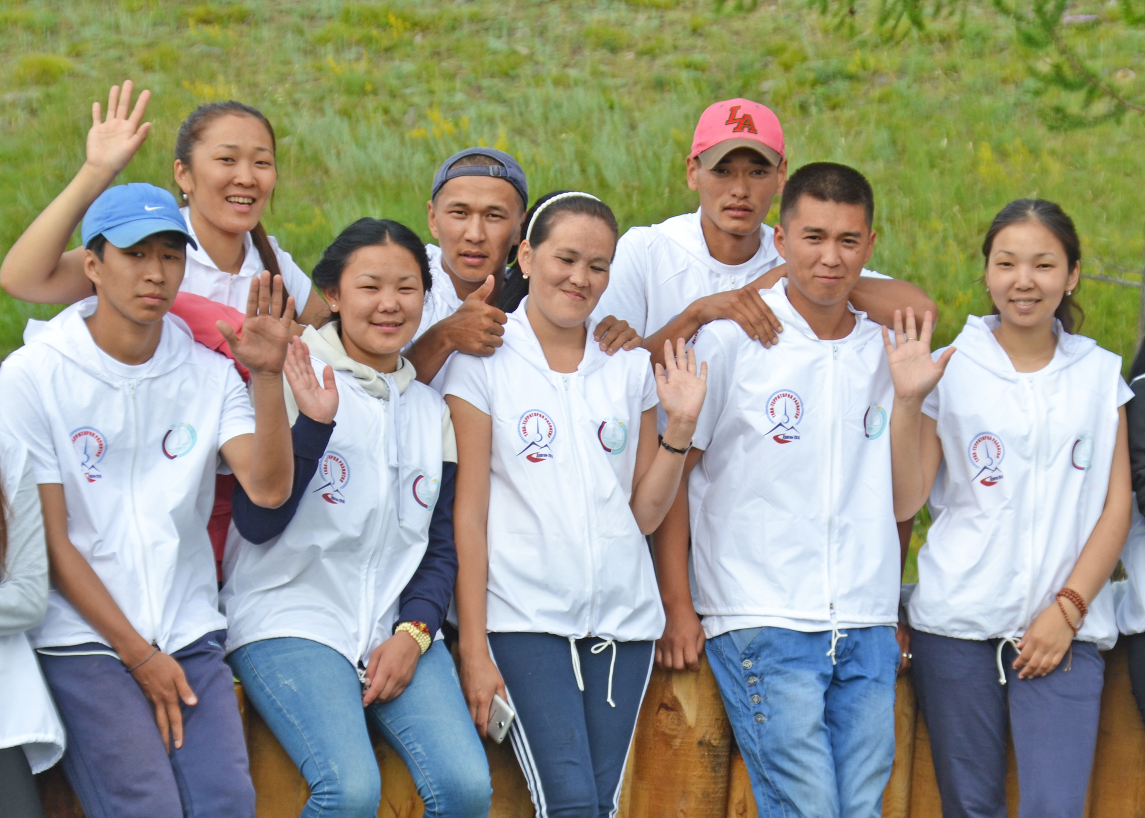 Форум Дурген 2014 год. Студенты Сут-Хольского кожууна